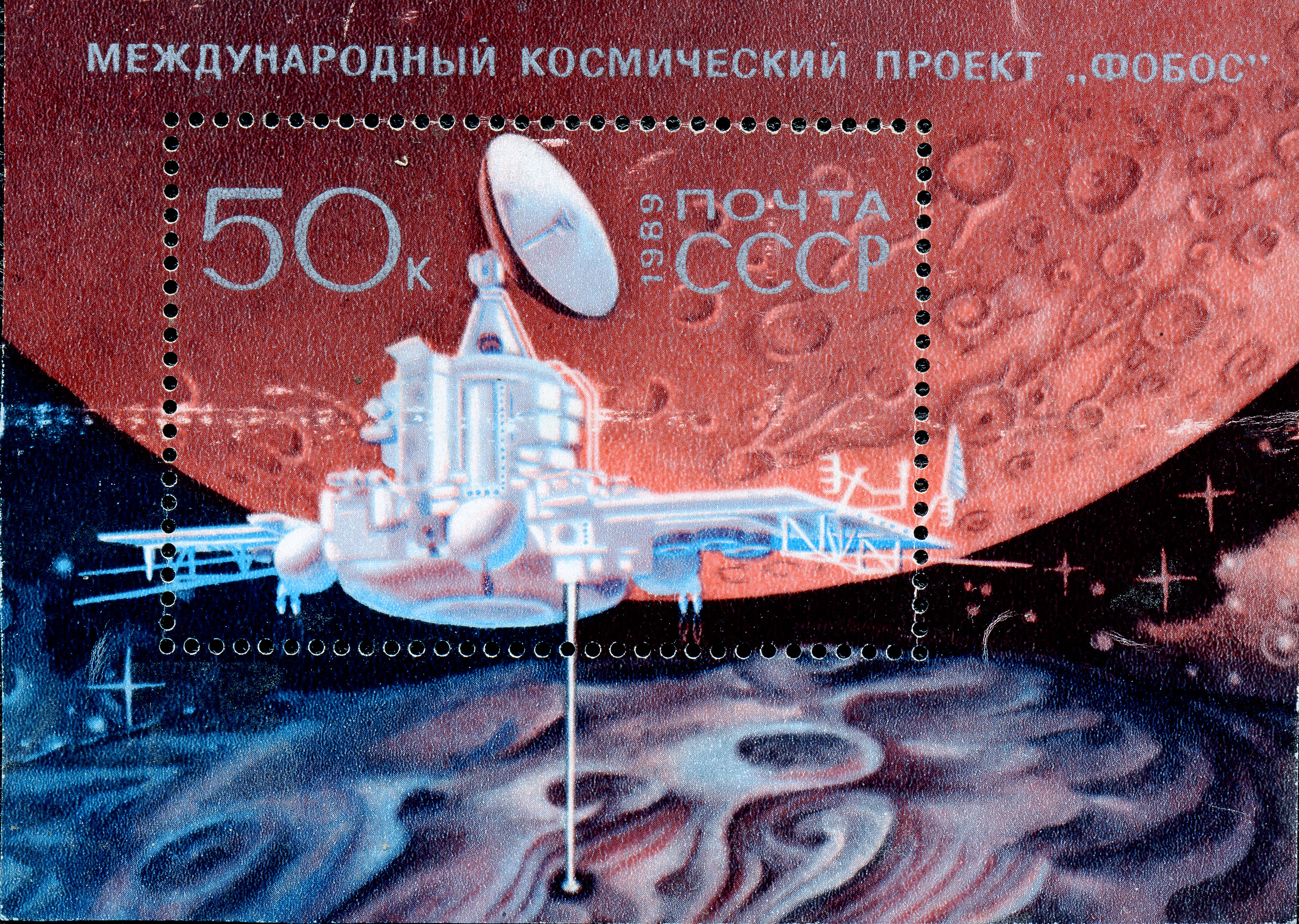 Почтовая марка СССР. 1989. Международный космический проект Фобос